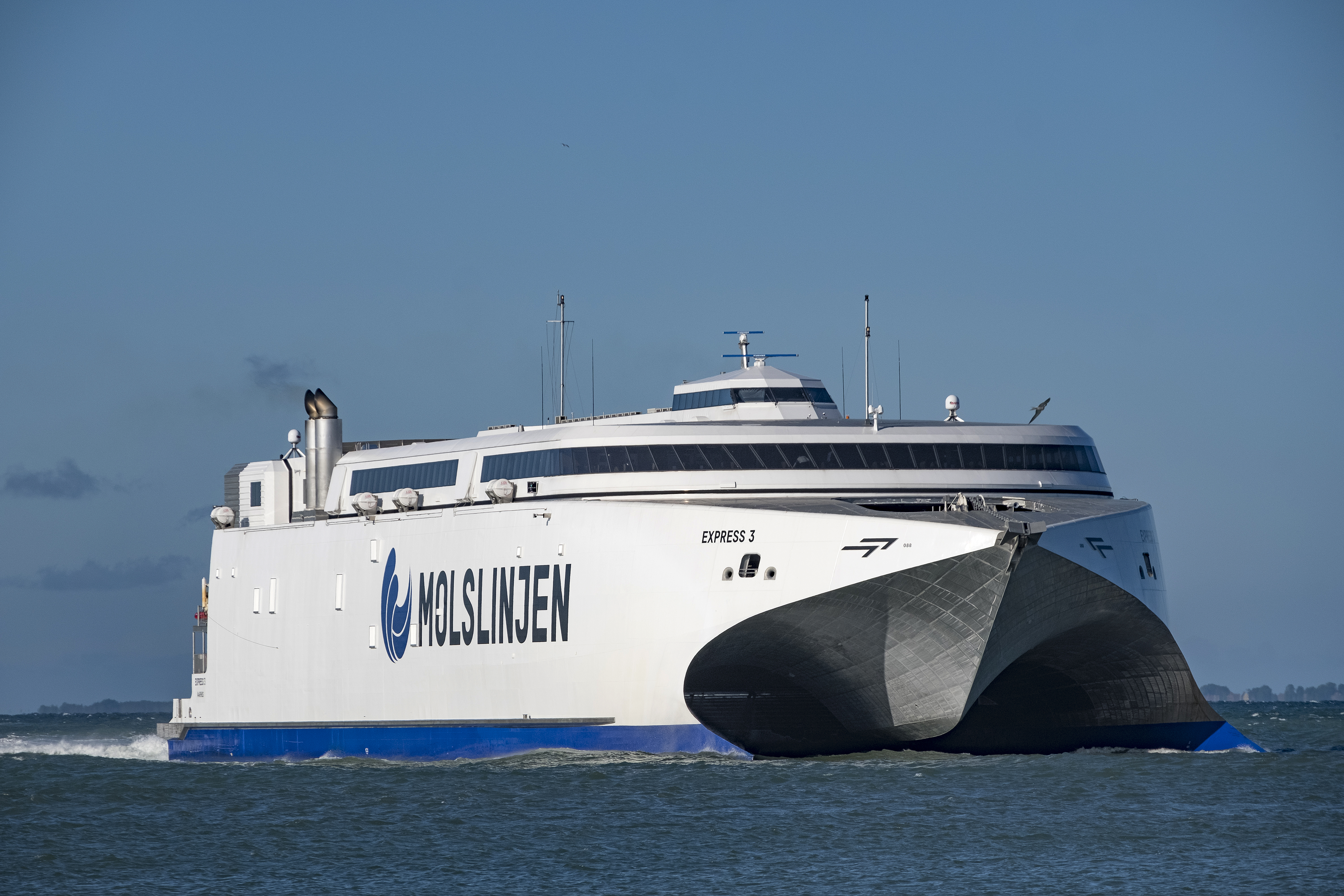 Moljslinjens katamaran Express 3 på väg in i hamnen vid Odden på Själland. Därifrån kör Molslinjen sedan på 1 timm och 15 min till Aarhus hamn och på 55 min till Ebeltoft på Jylland...Photo: News Øresund - Johan Wessman.© News Øresund - Johan Wessman (CC BY 3.0)..Detta verk av News Øresund är licensierat under en Creative Commons Erkännande 3.0 Unported-licens (CC BY 3.0). Bilden får fritt publiceras under förutsättning att källa anges. .The picture can be used freely under the prerequisite that the source is given. News Øresund, Malmö, Sweden.News Øresund är en oberoende regional nyhetsbyrå som är en del av det oberoende dansk-svenska kunskapscentrat Øresundsinstituttet...